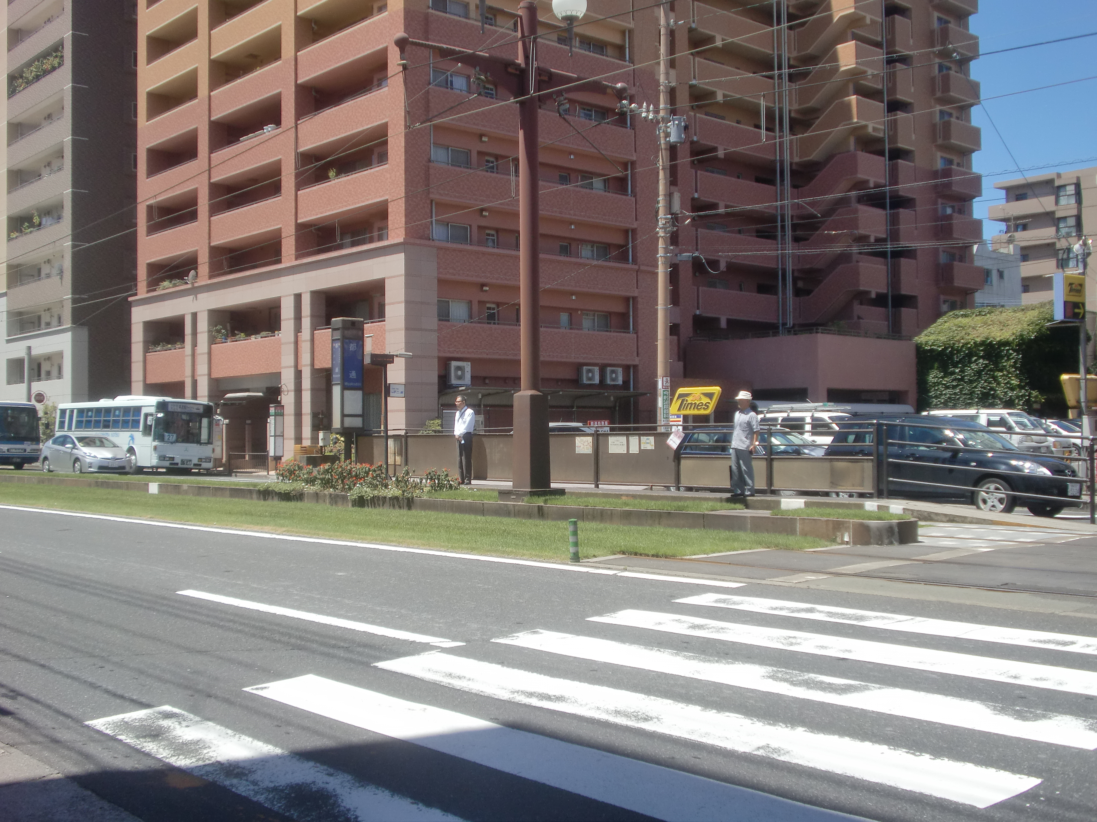 都通駅の外観